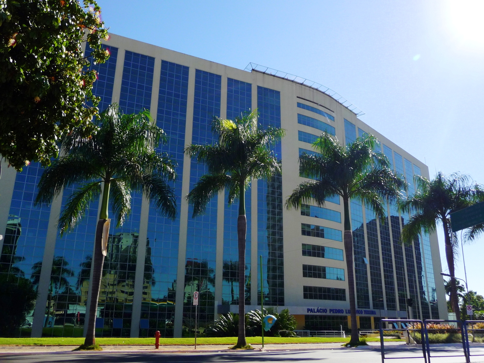 Palácio Pedro Ludovico Teixeira, em Goiânia, no ano de 2010.